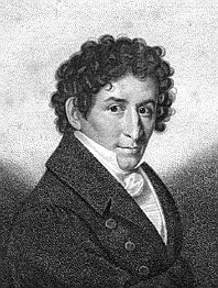 Ludwig Devrient (1784-1832), deutscher Schauspieler